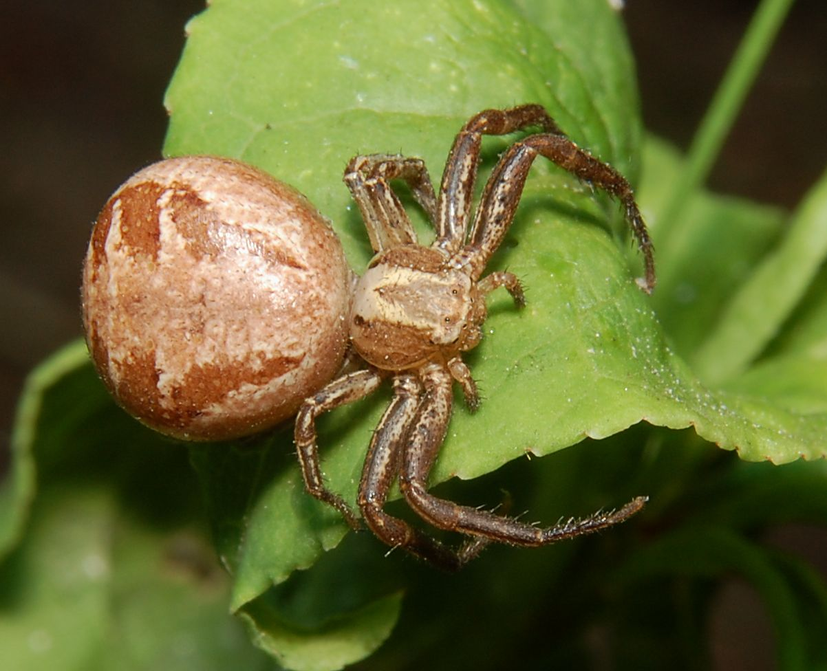 Xysticus audax, female, det. von K.-H. Kielhorn, Berlin